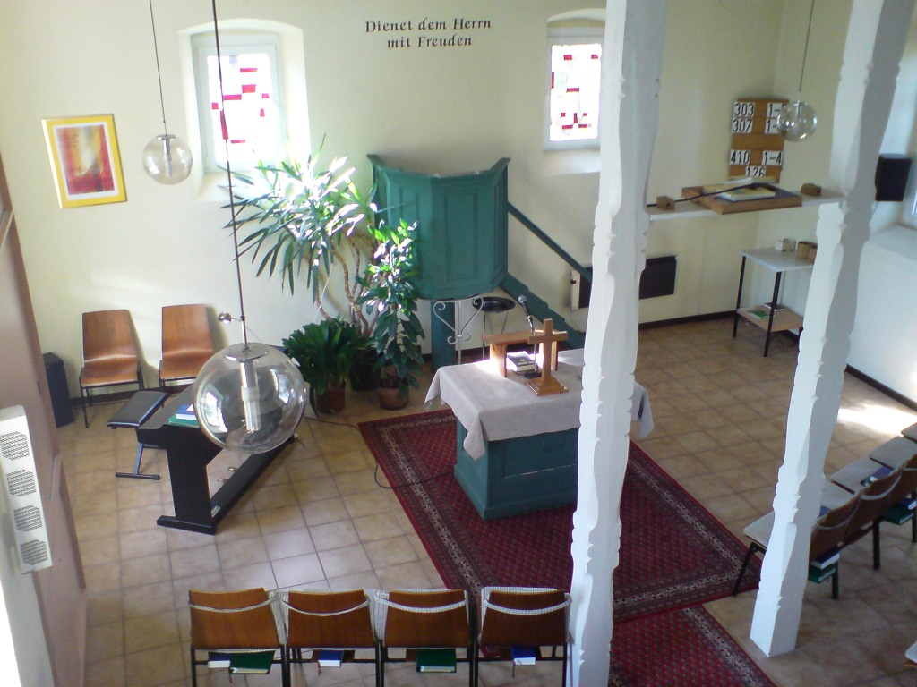 Mennonitenkirche Kühbörncheshof in Katzweiler, Rheinland-Pfalz, Deutschland / Germany